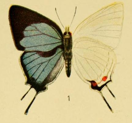 Iolaus schultzei